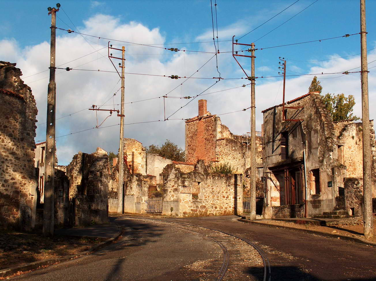 Hoofdstraat in Oradour sur Glane. Foto gemaakt in oktober 2004 door GvdBor. Publiek domein en toestemming voor plaatsing op wikipedia door mij, G van den Bor.